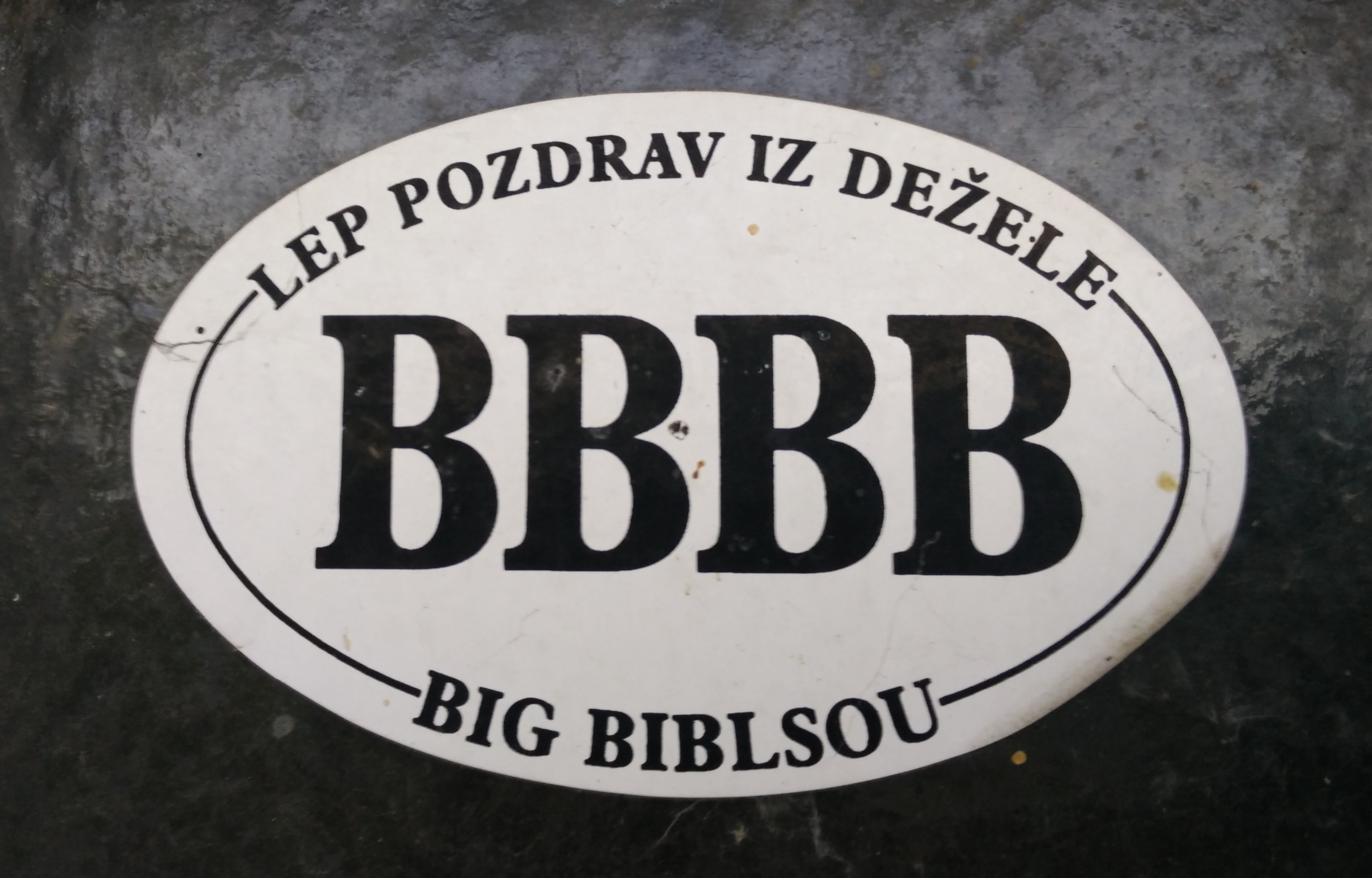 Nalepka BBBB.